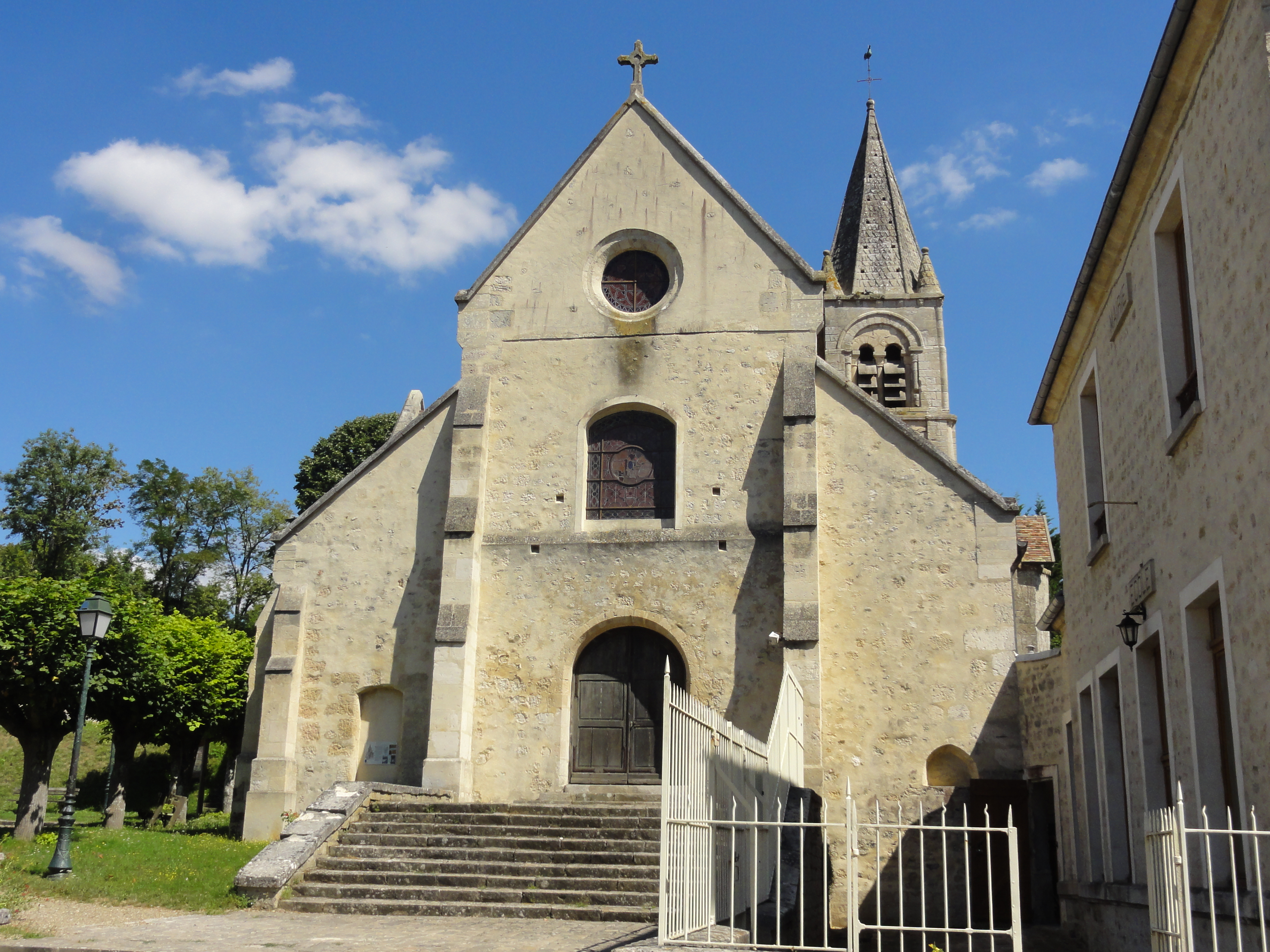 Façade occidentale.